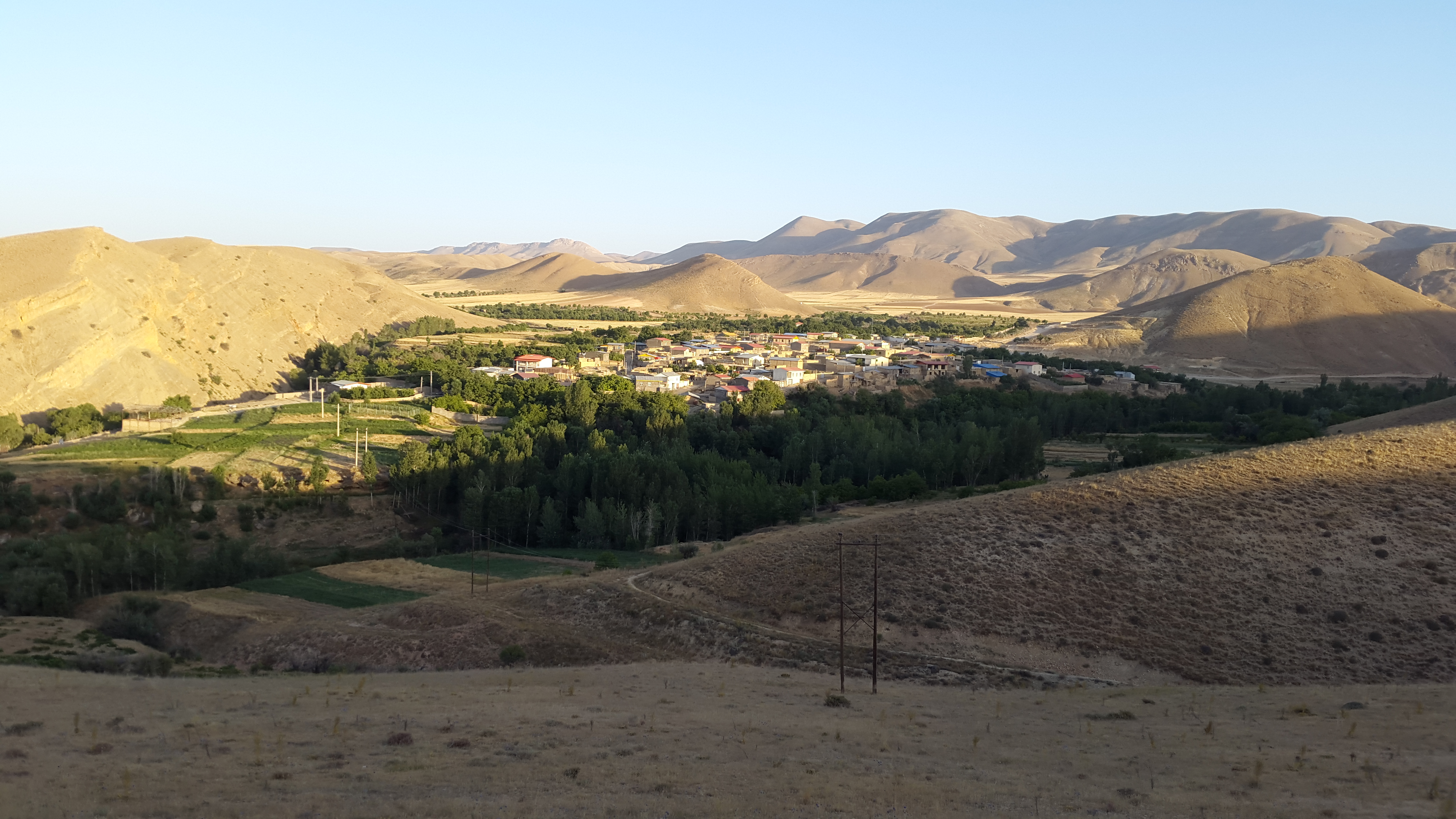 نمای روستا از ارتفاع